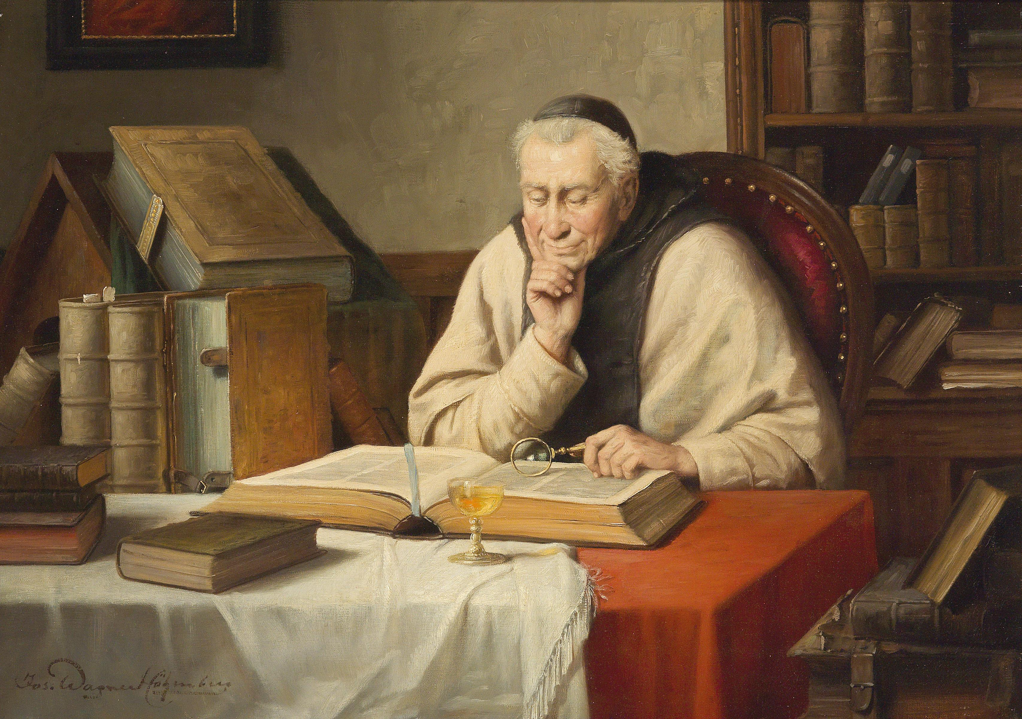 Lesender Mönch, signiert Jos. Wagner Höhenberg, Öl auf Leinwand, 50 x 70 cm